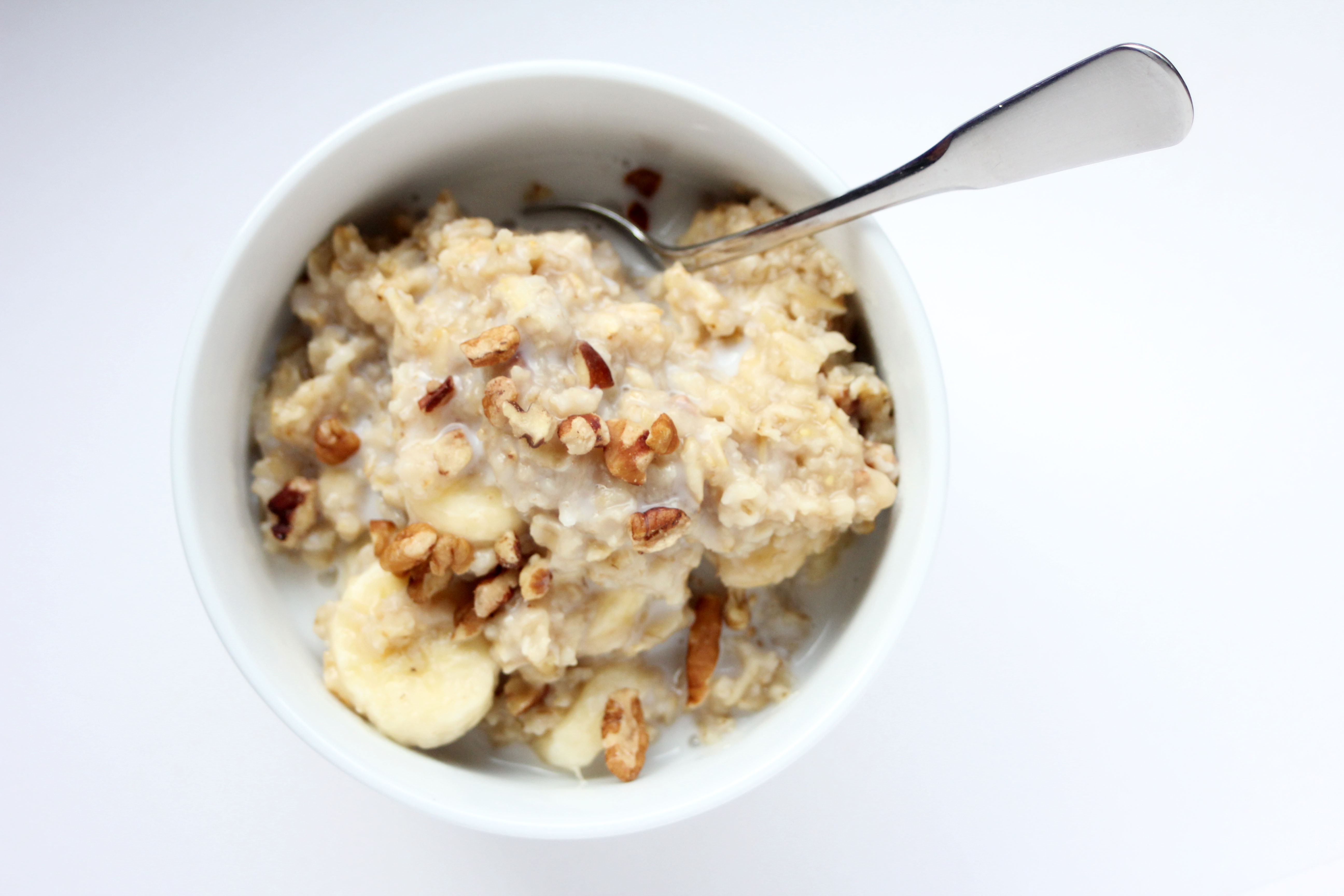 Vegan Oatmeal